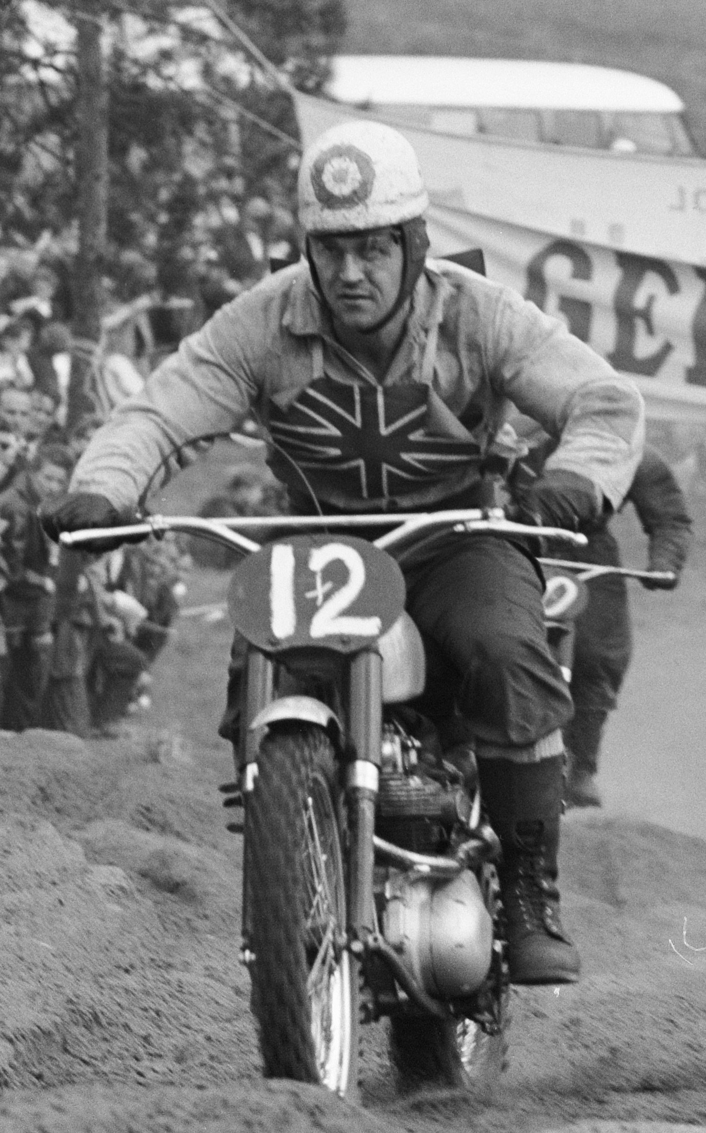 Motorcros 1962 De Zandberg te Bergharen Jeff Smith